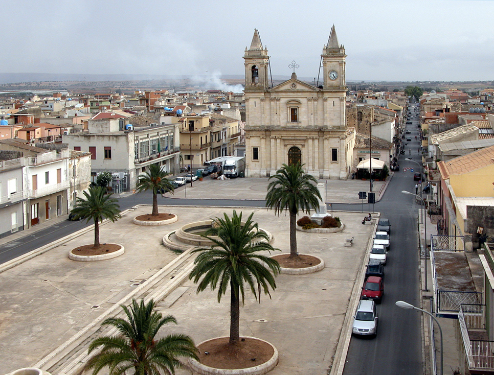 Chiesa Madre di Acate This is a photo of a monument which is part of cultural heritage of Italy.